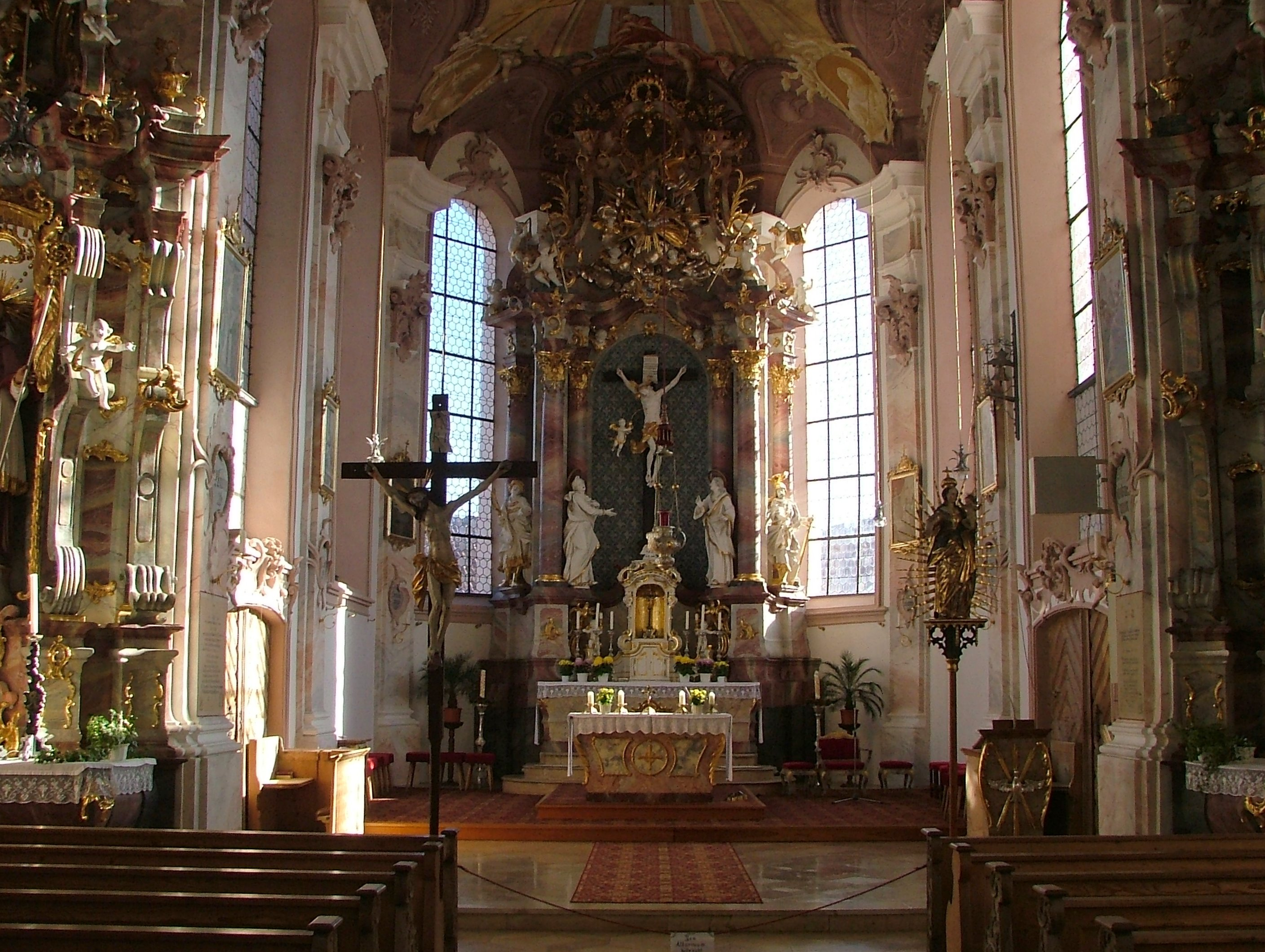 Stöttwang